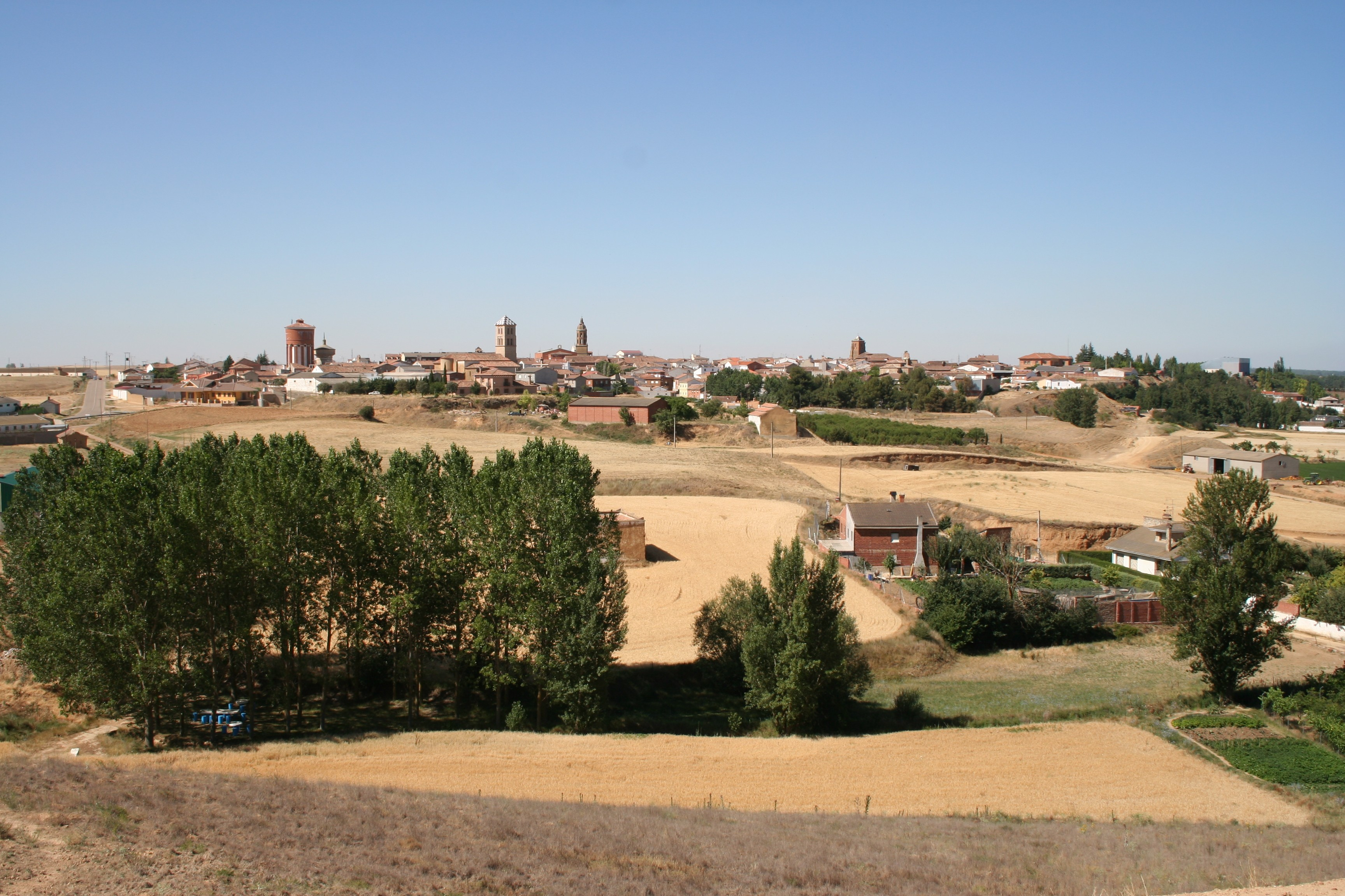 Vista general desde el teso Miravete